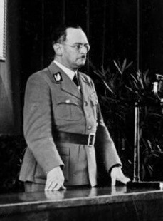 Staatsbesuch des Reichs und Preußischen Ministers des Innern Dr. Wilhelm Frick in Sudetenland